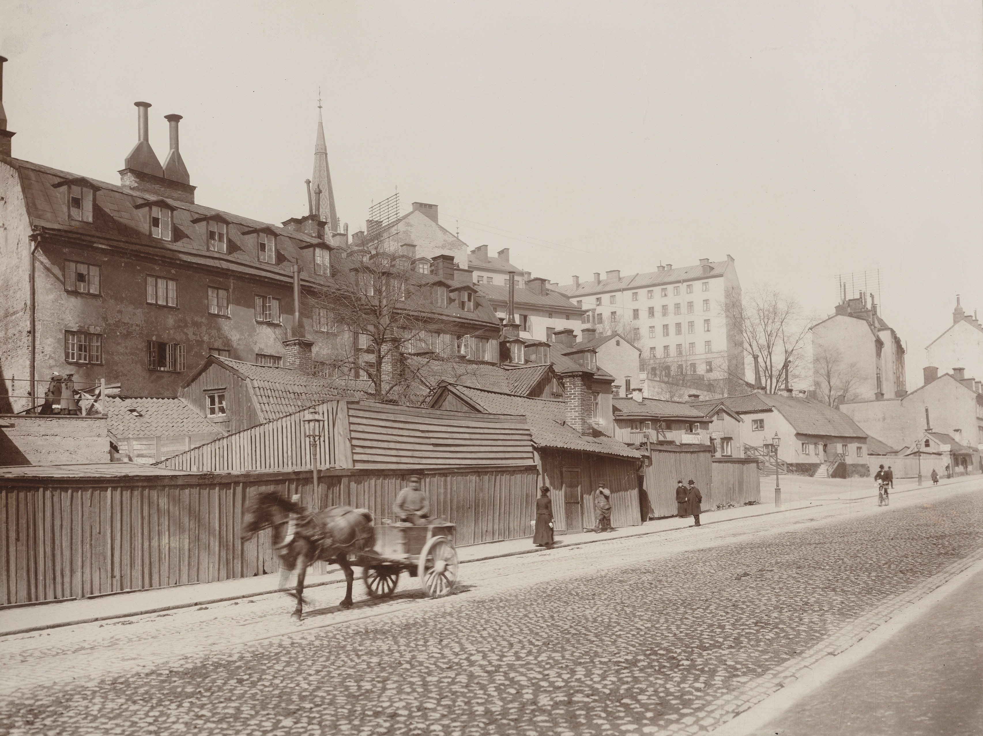 Stora Träskgatan (nuv. Birger Jarlsgatan), vy mot norr, t.v. kvarteret Italien större